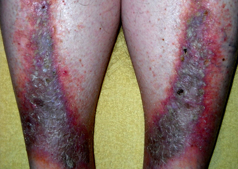 Stasis dermatitis (Gravitational eczema)